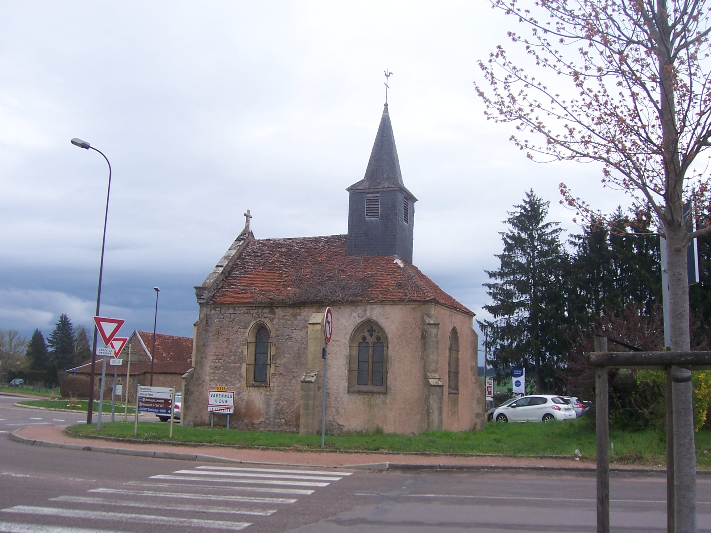 Eglise de Varennes-sous-Dun